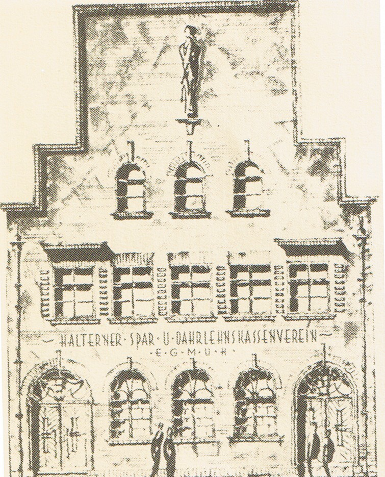 Erste Bankgebäude Voba Haltern eG